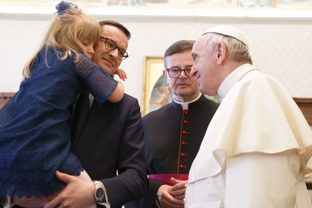 2018.06.04 Watykan Premier Mateusz Morawiecki złożył wizytę w Watykanie. Fot. Krystian Maj / KPRM